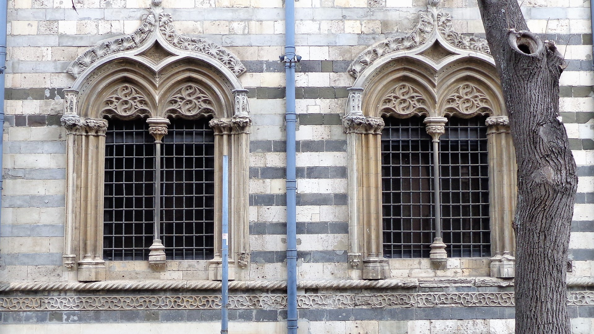 Bifore, esterno destro